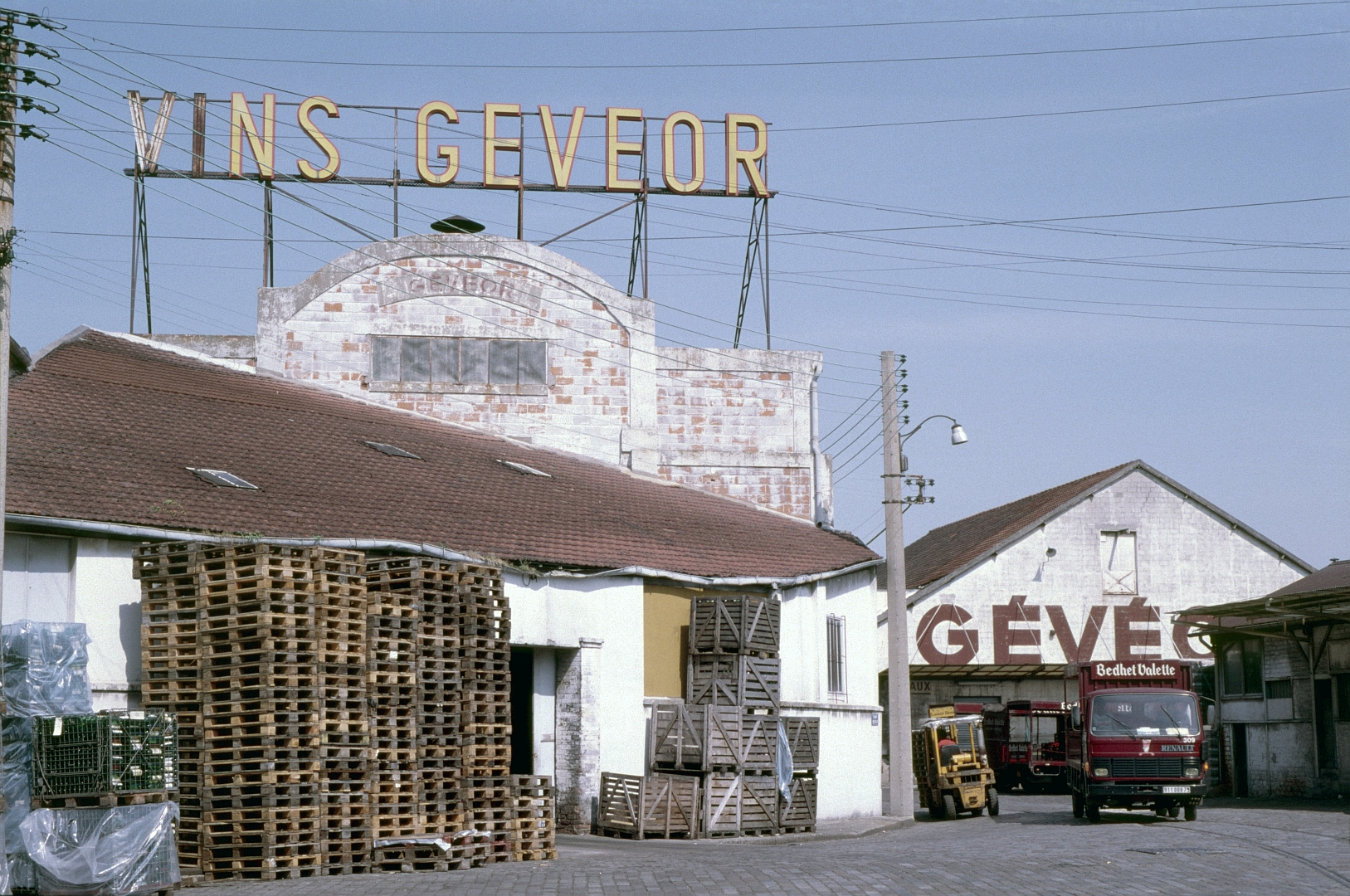 Les entrepôts de Bercy dans le 12e arrondissement de Paris, le 29 août 1985.